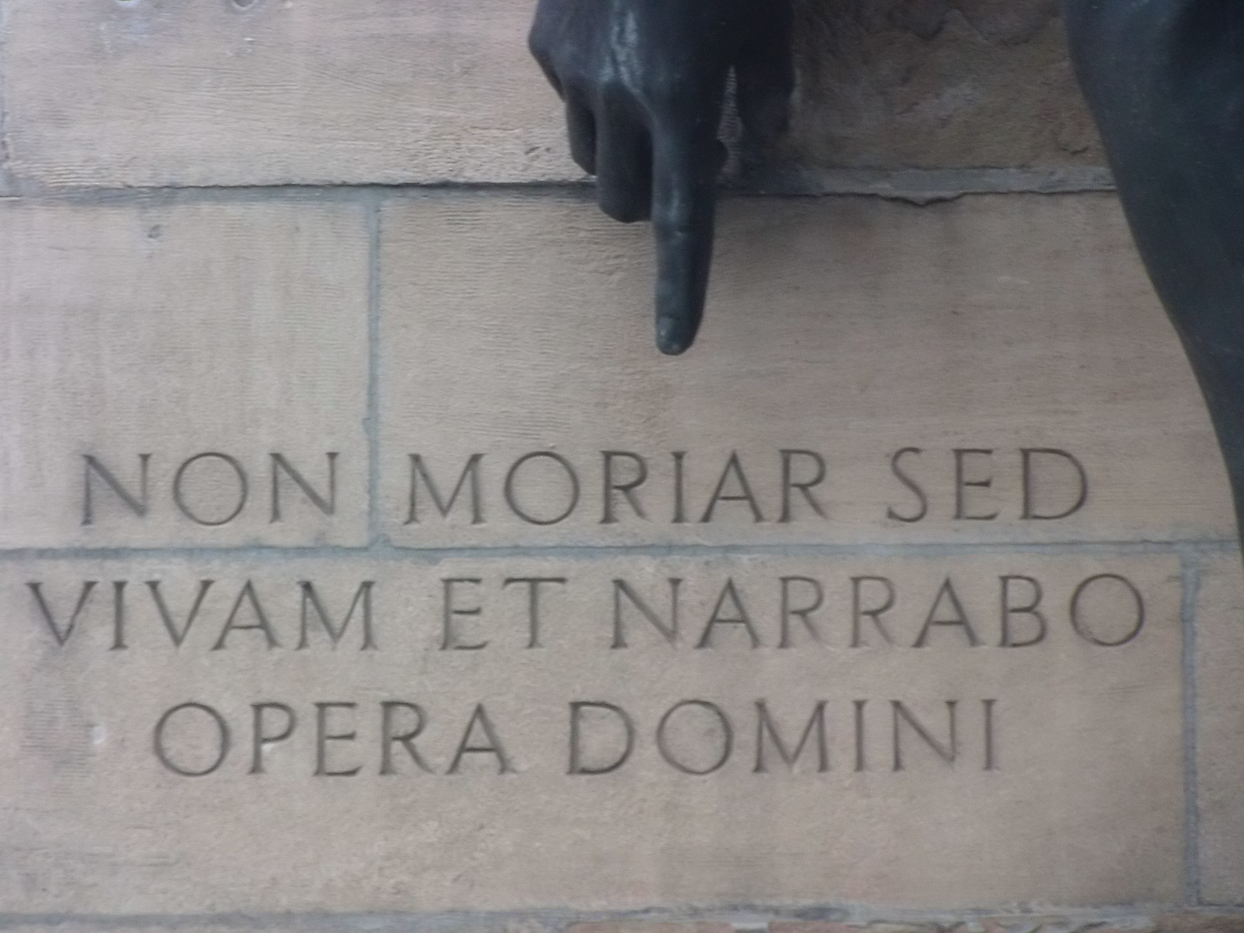 According to article 27 of the Copyright Act (en/de/fr/it), works installed at or on publicly accessible places or ground may be pictured, and such pictures may be offered for sale, sold, transmitted, or otherwise published. The image must not be three-dimensional and it must not be possible to use the picture for the same purpose as the original. The works must be permanently installed, but for the purposes of the law, "permanent" means a fixed installation which may be temporary -- time limited -- but not "accidental", e.g. due to transport of the work. Freedom of panorama Inscription - Philibert Berthelier -- Tour de l'Île (Genève)